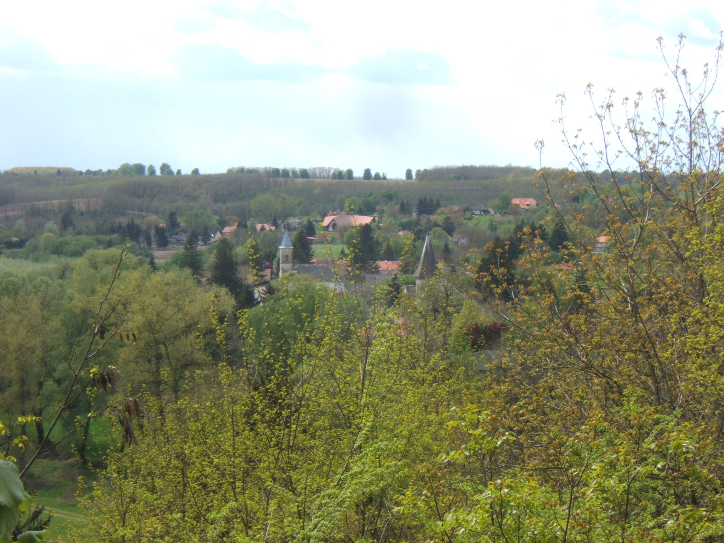 Bárdudvarnok, Kaposszentbenedek látképe